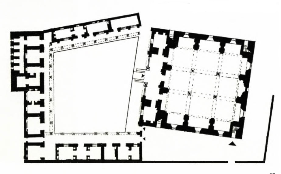 Aşağı Gövhərağa məscidinin planı